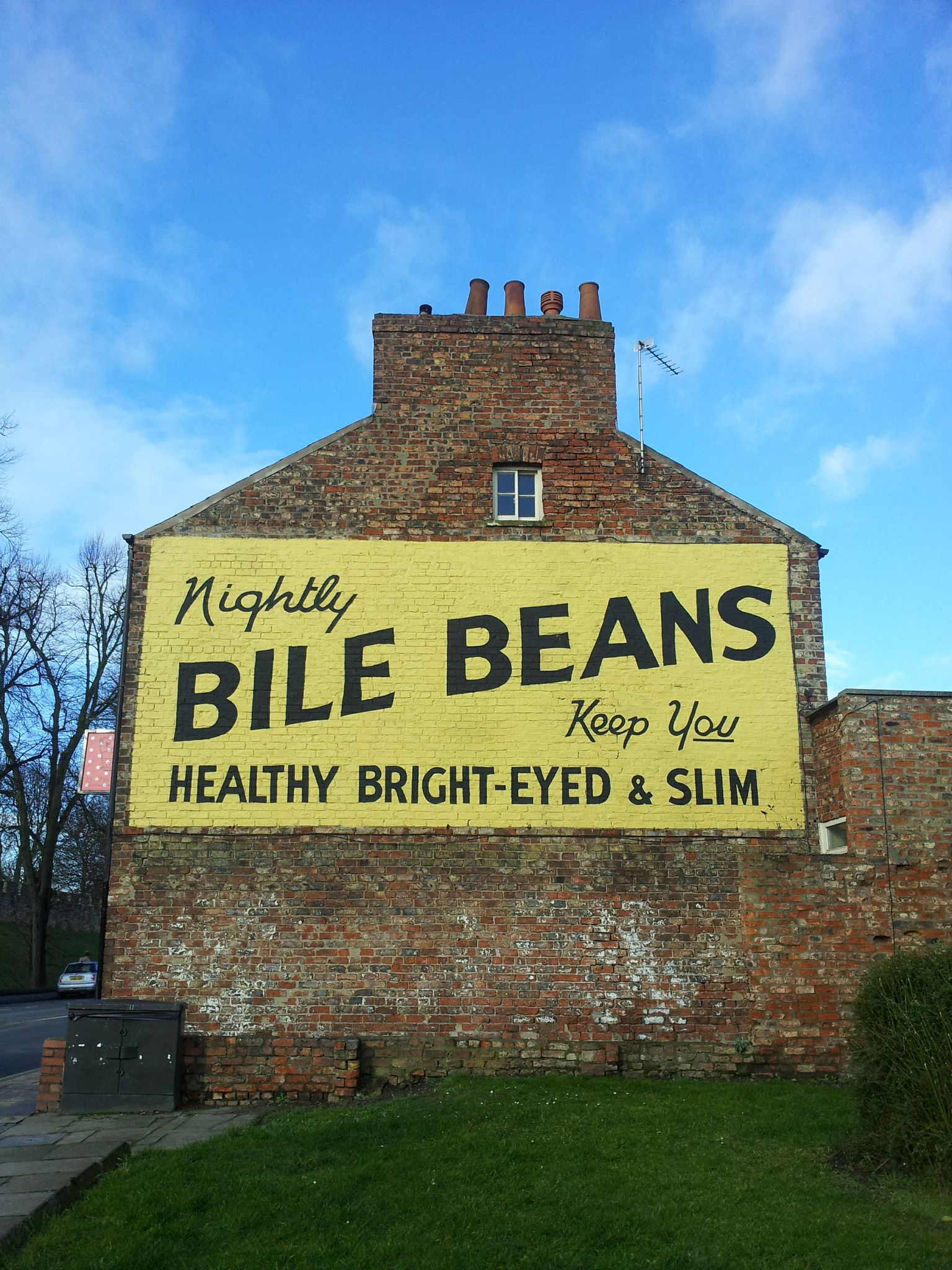 Retro signage